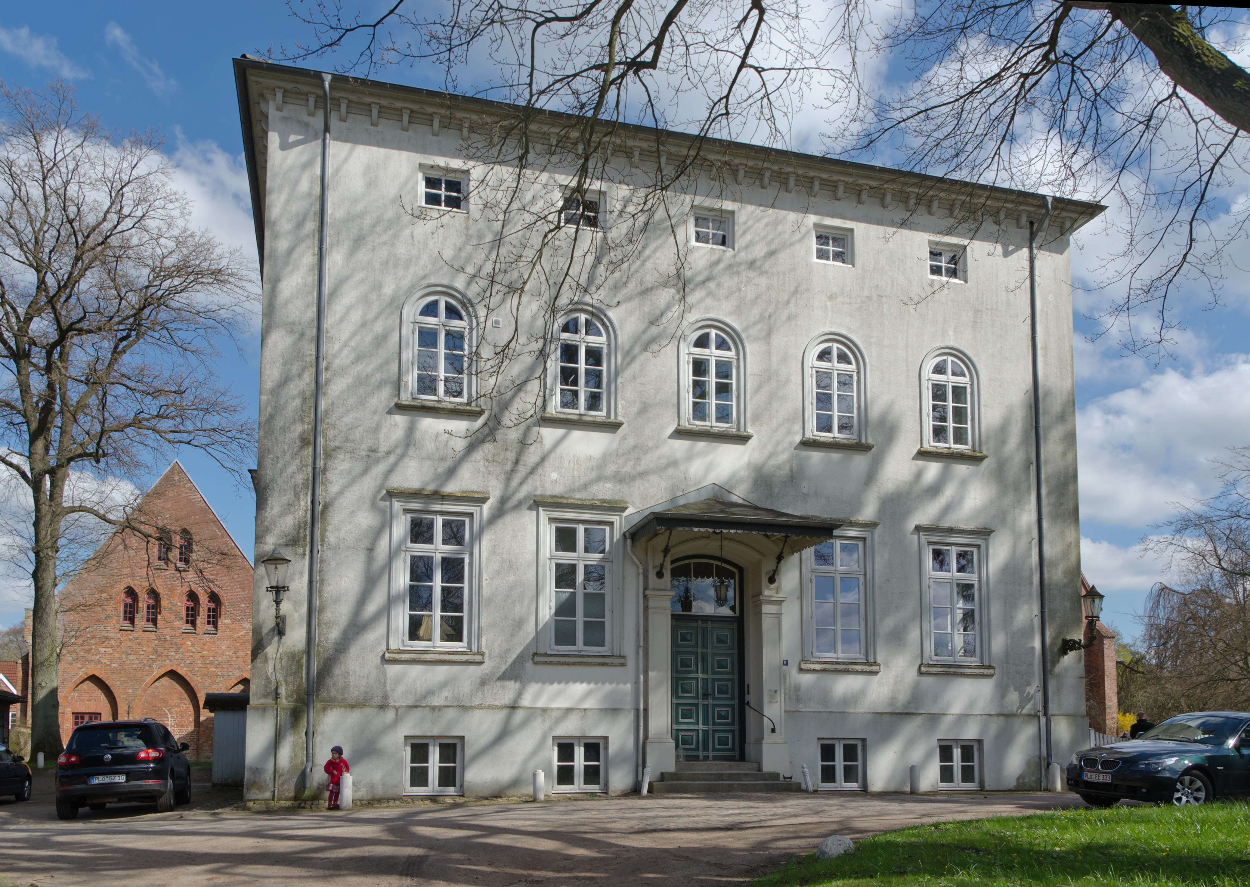 Preetz Klosterhof 8 Probstenhaus